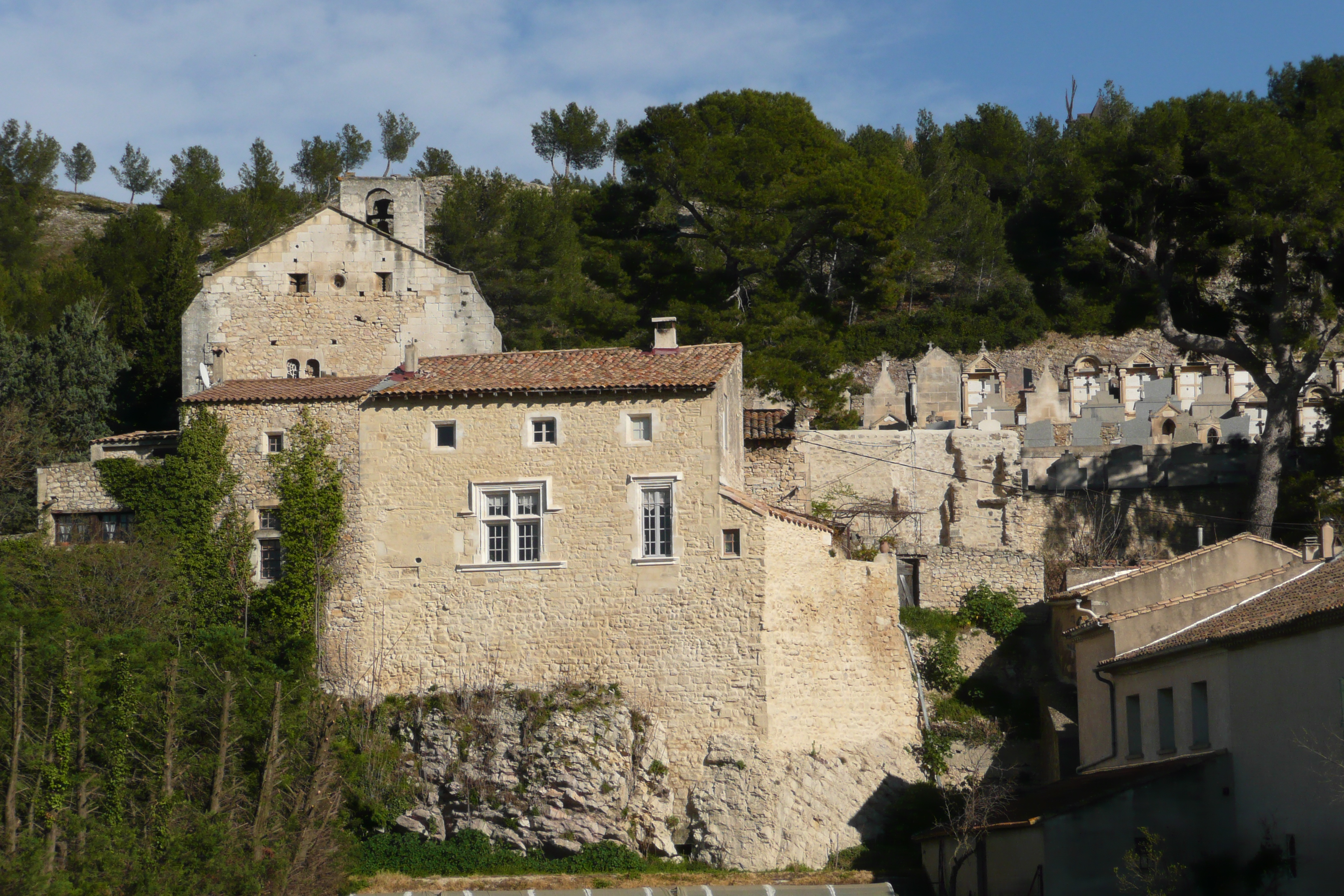 Boulbon.